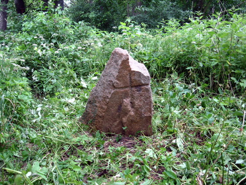 Накрышкі. Камень з крыжам